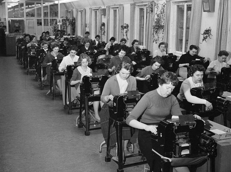 Personal i arbete på Postgirot, Klara Norra Kyrkogata 12-16/Bryggargatan 1-9/Drottninggatan 49-53/Mäster Samuelsgatan 50-58